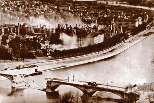 Einmarsch amerikanischer Truppen in Würzburg Anfang April 1945